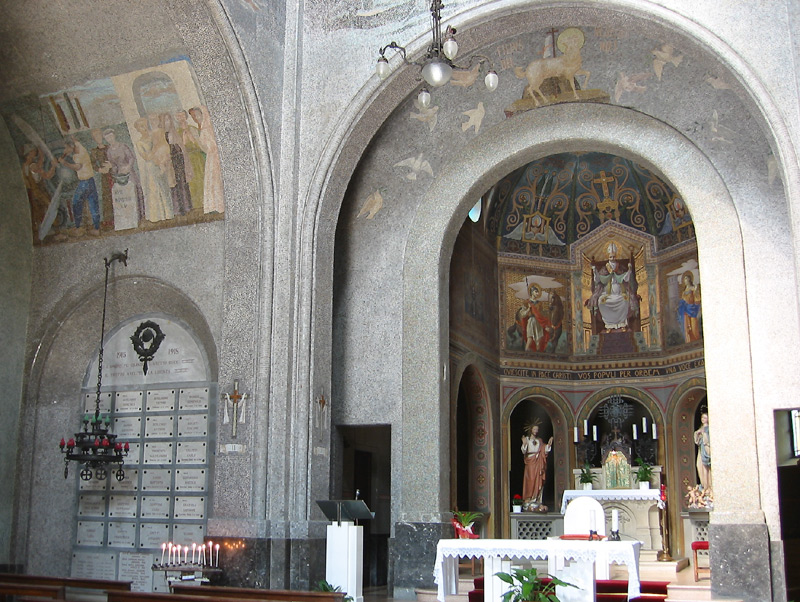 Dettaglio di uno dei mosaici all'interno del Tempio dei Caduti di San Pellegrino Terme